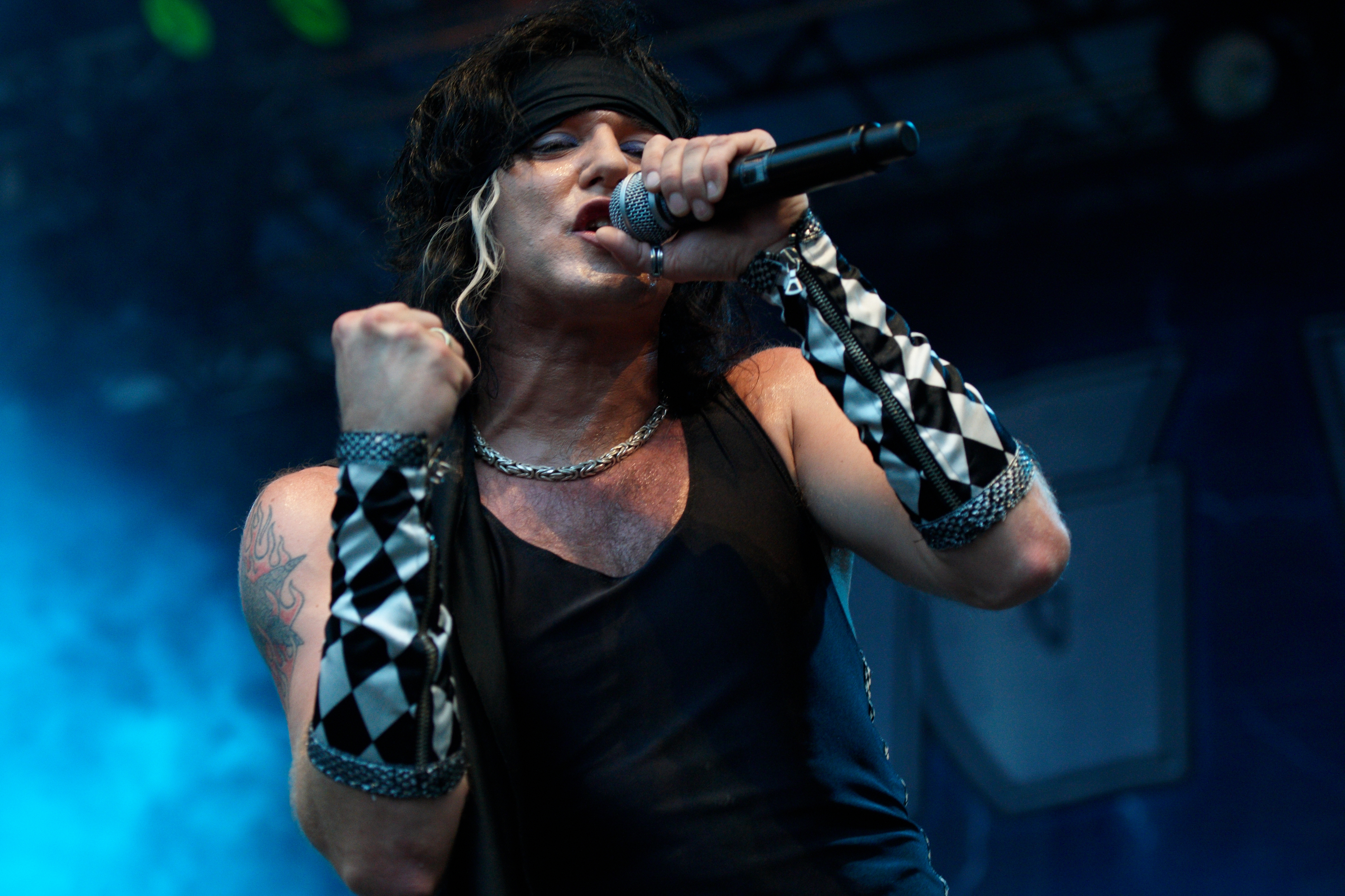 Åge Sten Nilsen from Wig Wam performing under Byfesten 2010, Lillestrøm, Norway.